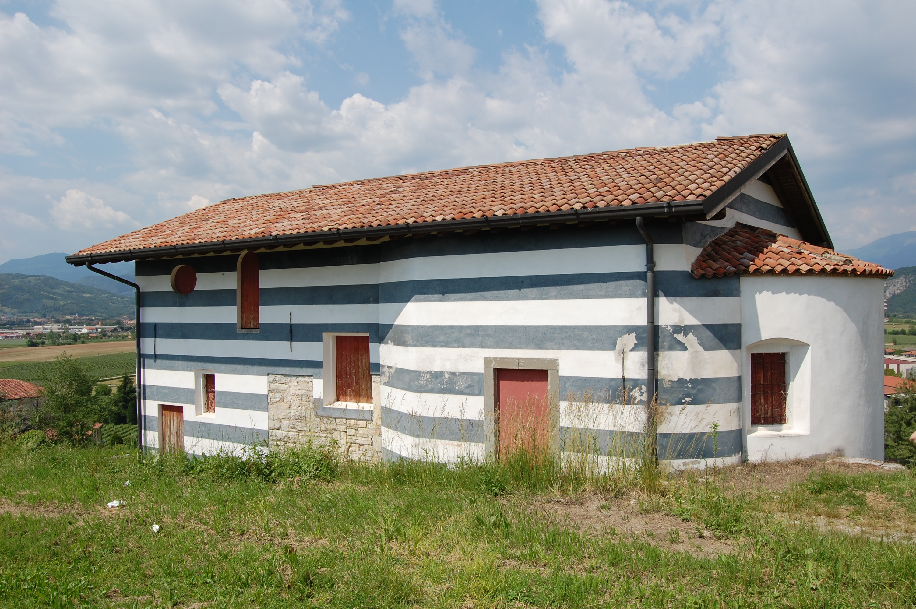 Chiesa di San Salvatore, sul colle del castello di Borgonato